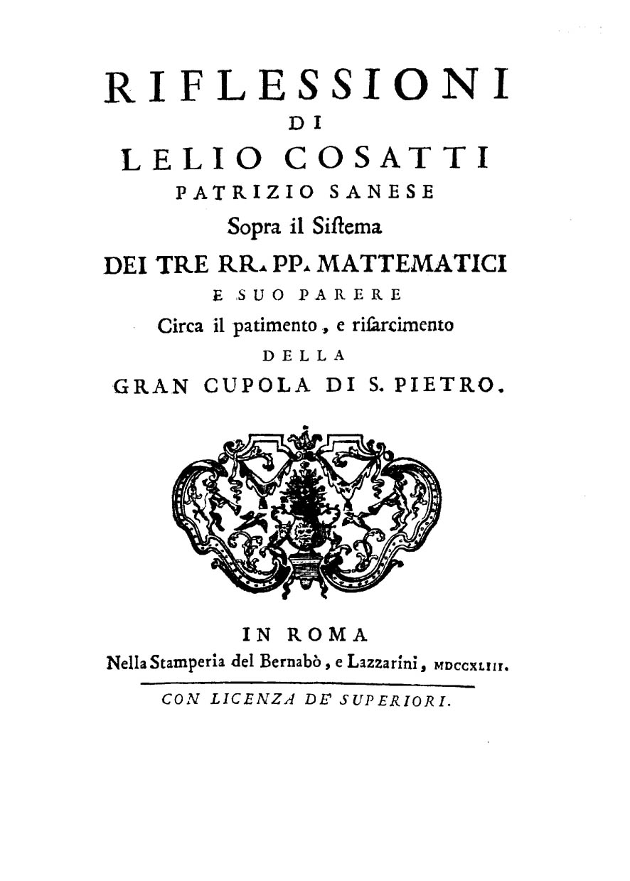 Riflessioni di Lelio Cosatti patrizio sanese sopra il sistema dei tre RR. PP. mattematici e suo parere circa il patimento, e risarcimento della gran cupola di S. Pietro. - In Roma : nella Stamperia del Bernabo, & Lazzarini, 1743. - XXXII p. ; 4º .